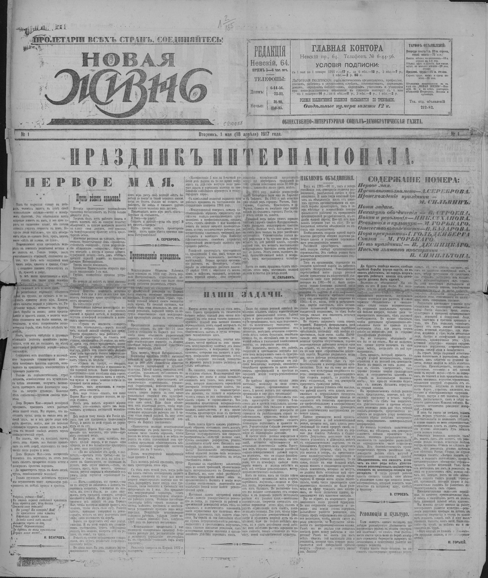 Первый номер "Новой жизни" от 18 апреля (1 мая) 1917 года